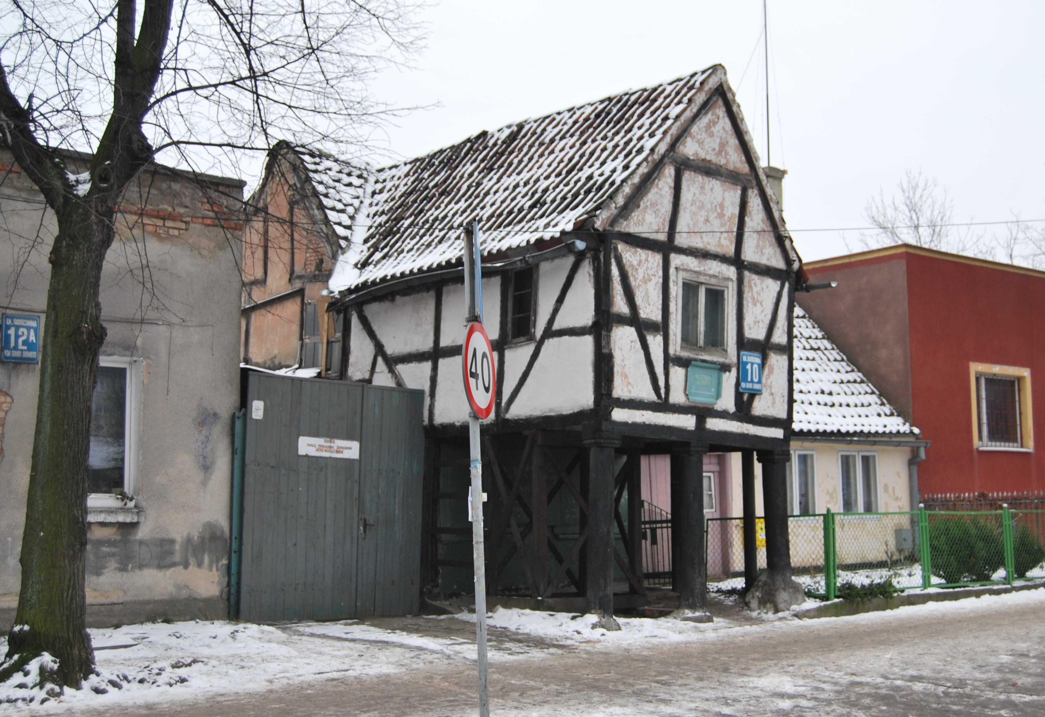 Gdańsk; Kuźnia ( ok 1800 r.) ul. Gościnna 10